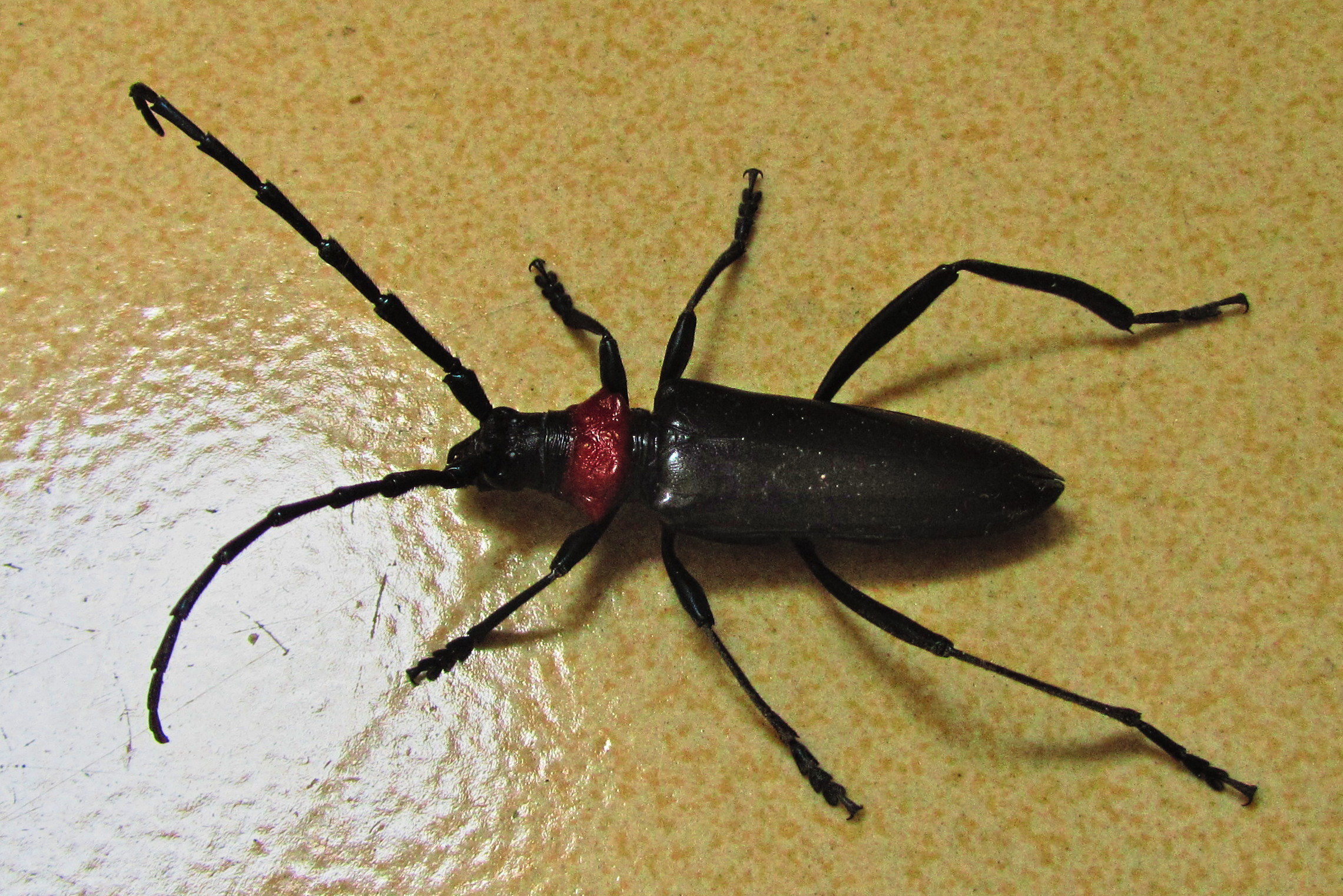 桃红颈天牛俯视图